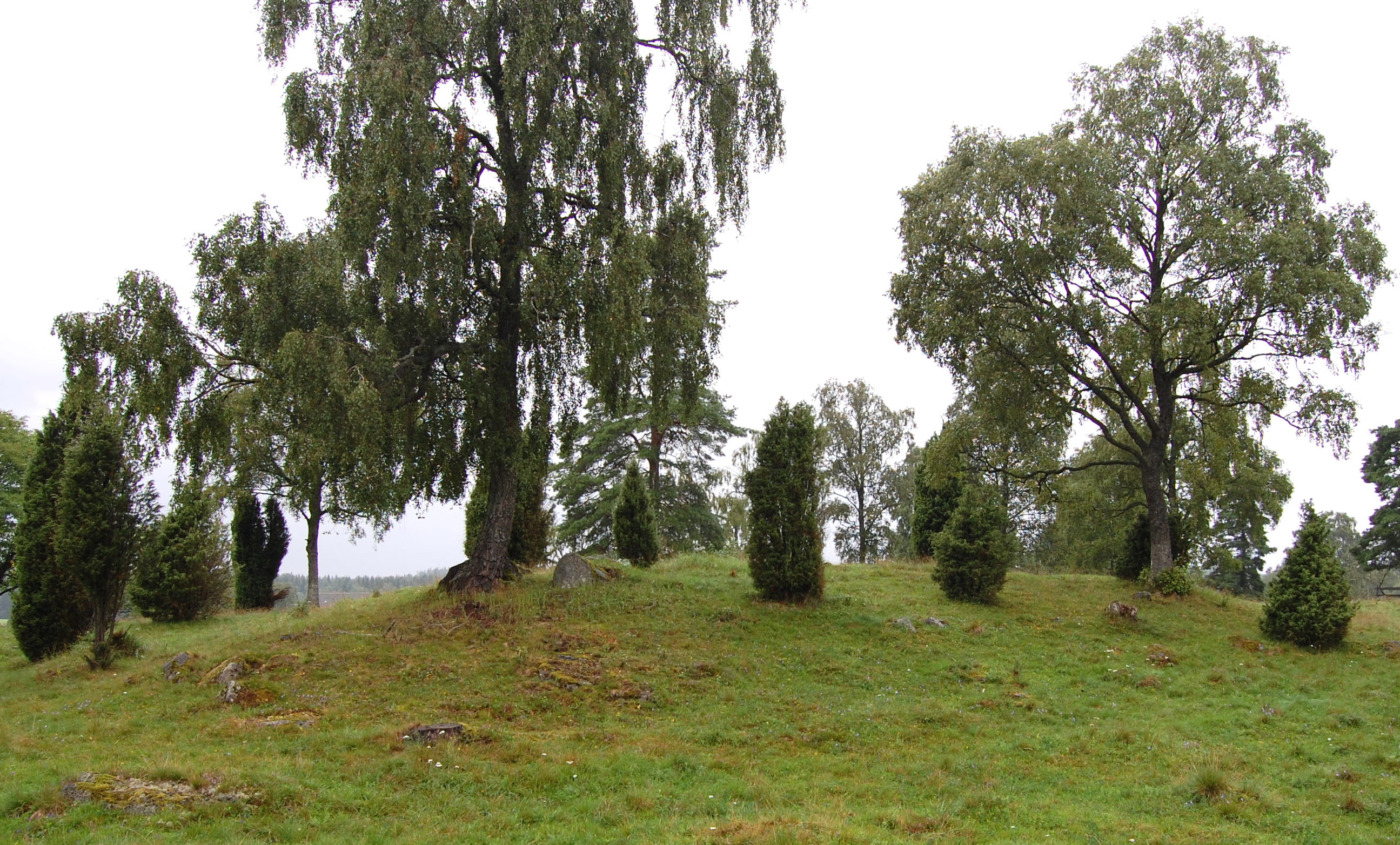 Gräberfeld von Vrigstad, mittlerer Teil